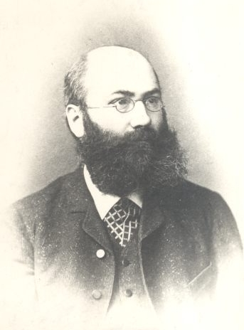 Wilhelm von Hoerschelmann, baltisaksa klassikaline filoloog